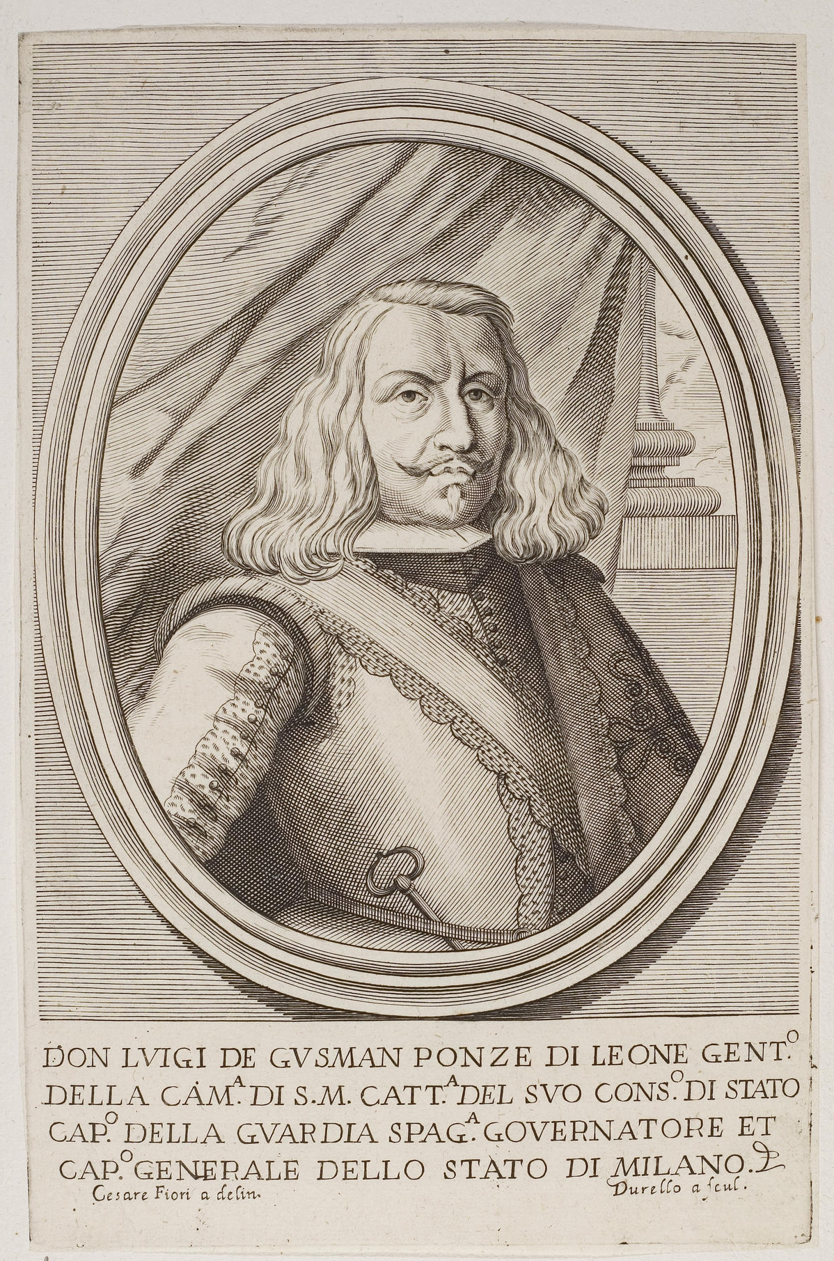 Grafik aus dem Klebeband Nr. 2 der Fürstlich Waldeckschen Hofbibliothek Arolsen. Motiv: Luis de Guzmán Ponce de Leon (1603–1668)